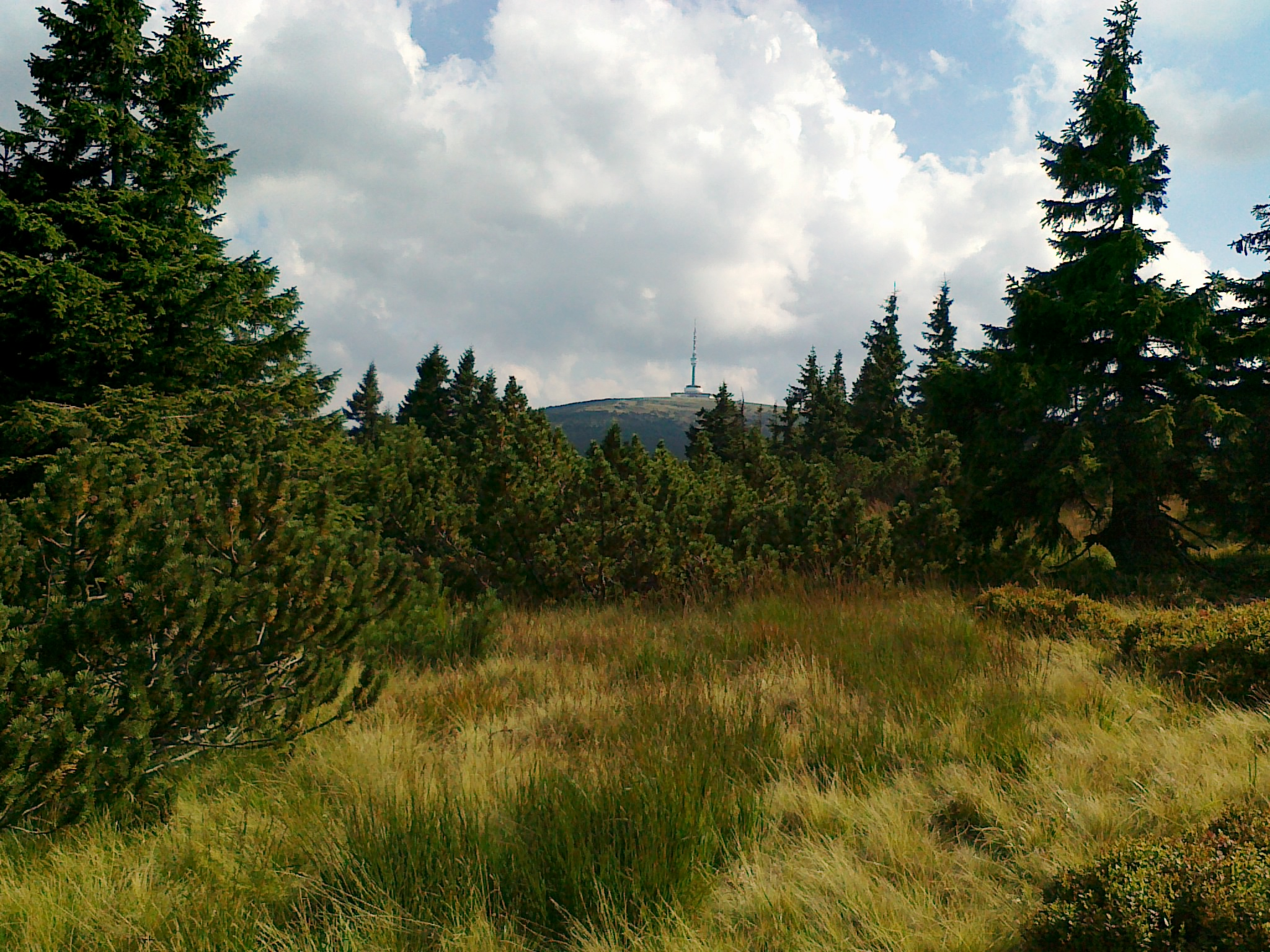 Widok z połaci szczytowej góry Malý Děd na górę Praděd